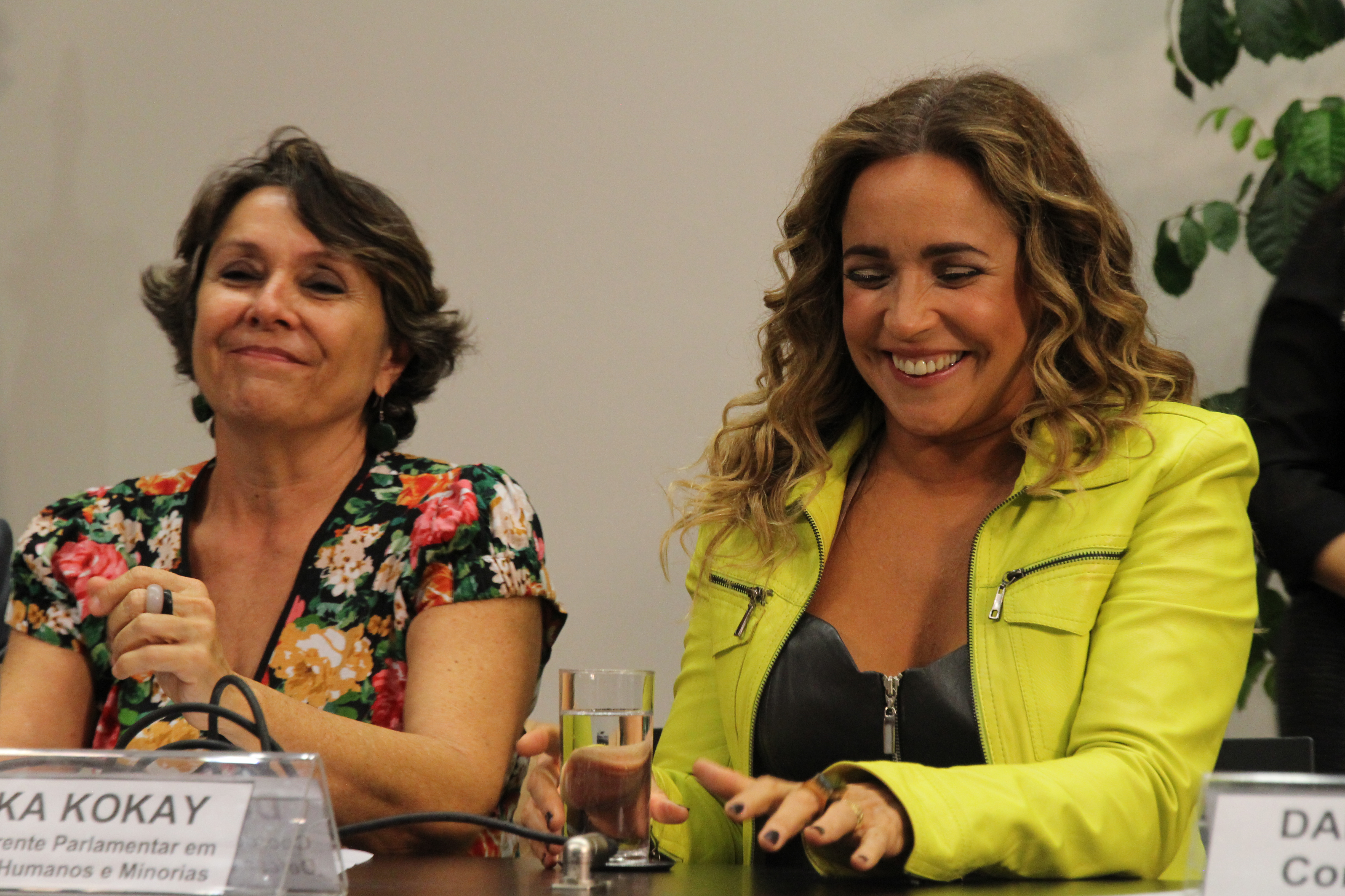 Tiago Zenero/PNUD Brasil